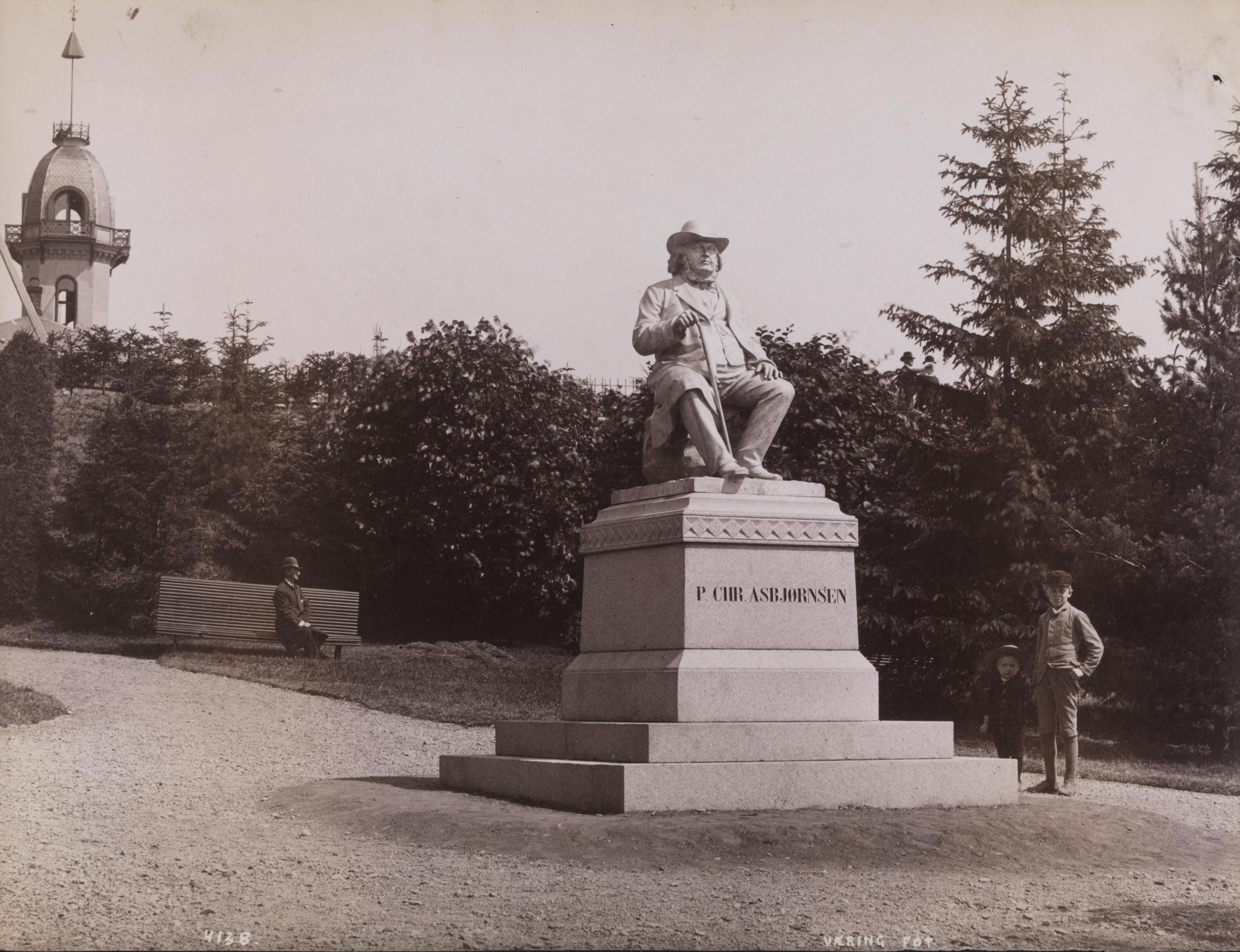 Bildet er hentet fra Nasjonalbibliotekets bildesamling